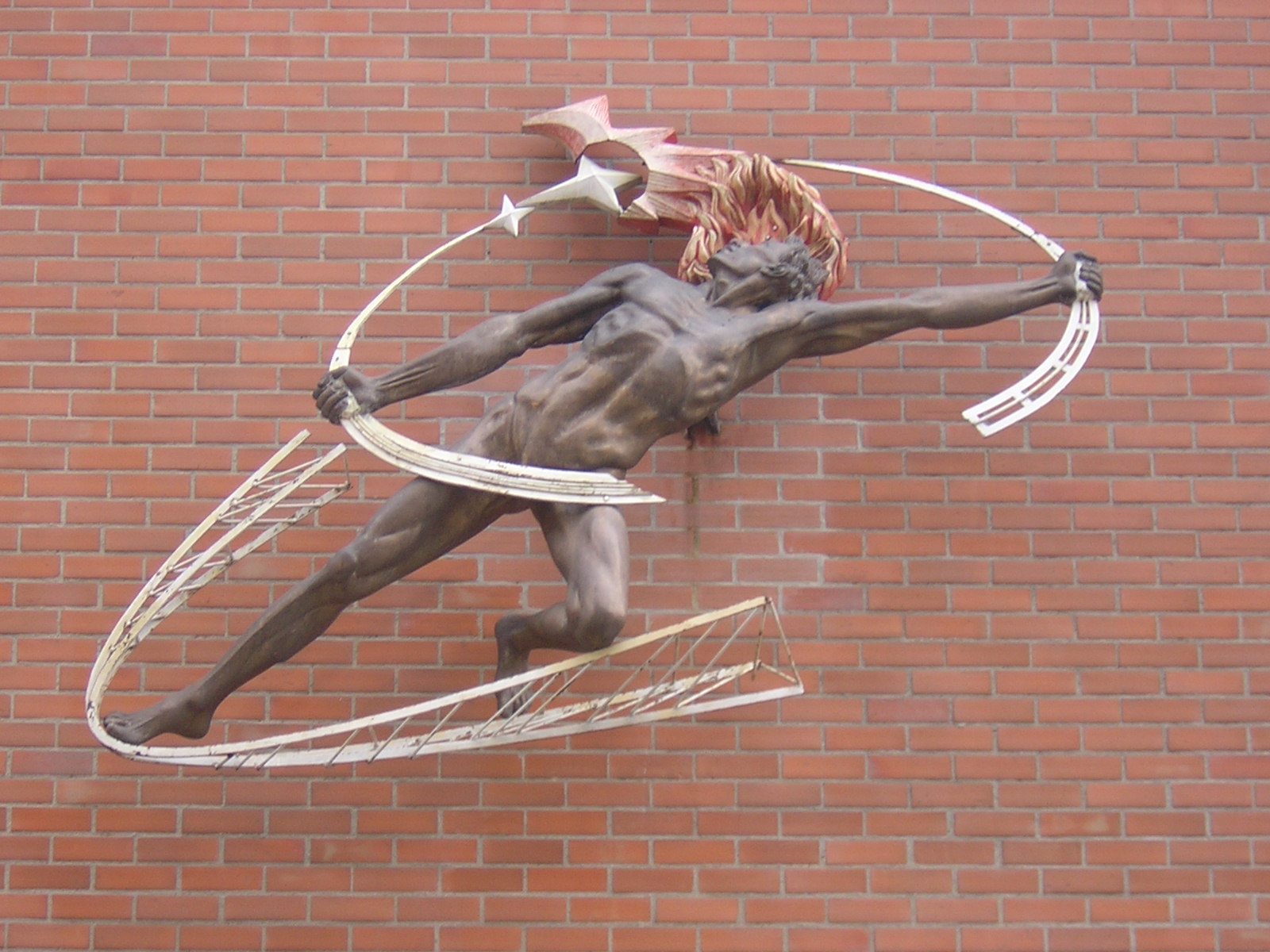 "Prometeo Encadenado", Escultura de Rodrigo Arenas Betancur, ubicado en la facaha de la "Casa del Museo" del Museo de Antioquia, Medellín, Colombia.